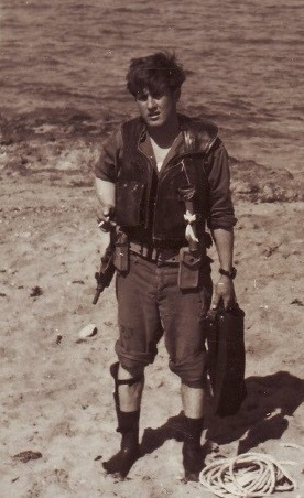 סגן יואל פלג בתקופת מחמת ההתשה